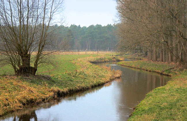 Wietze bei Mellendorf